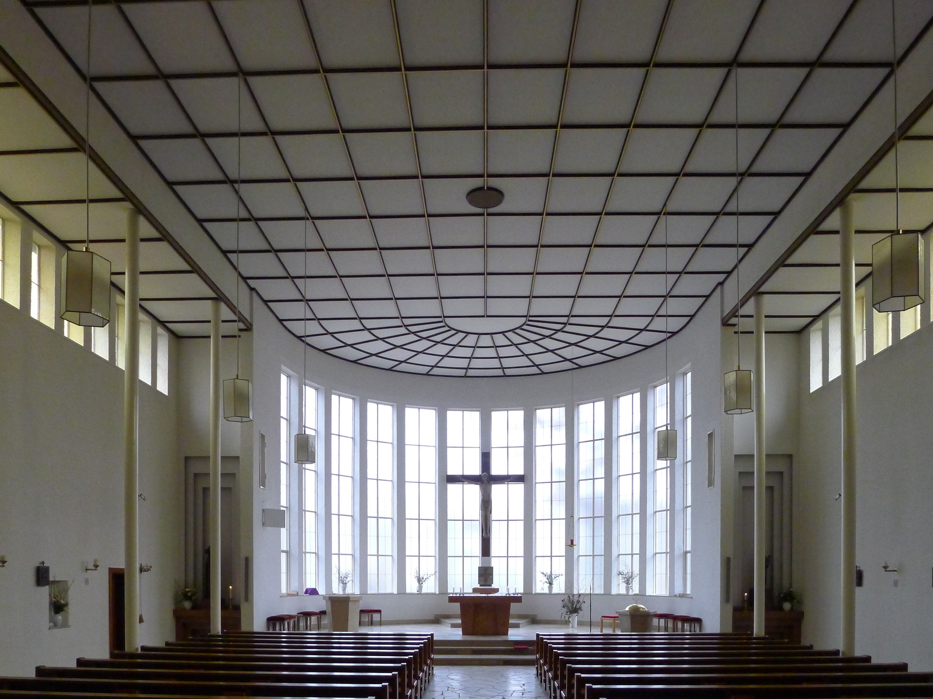 Blick in den Kirchraum